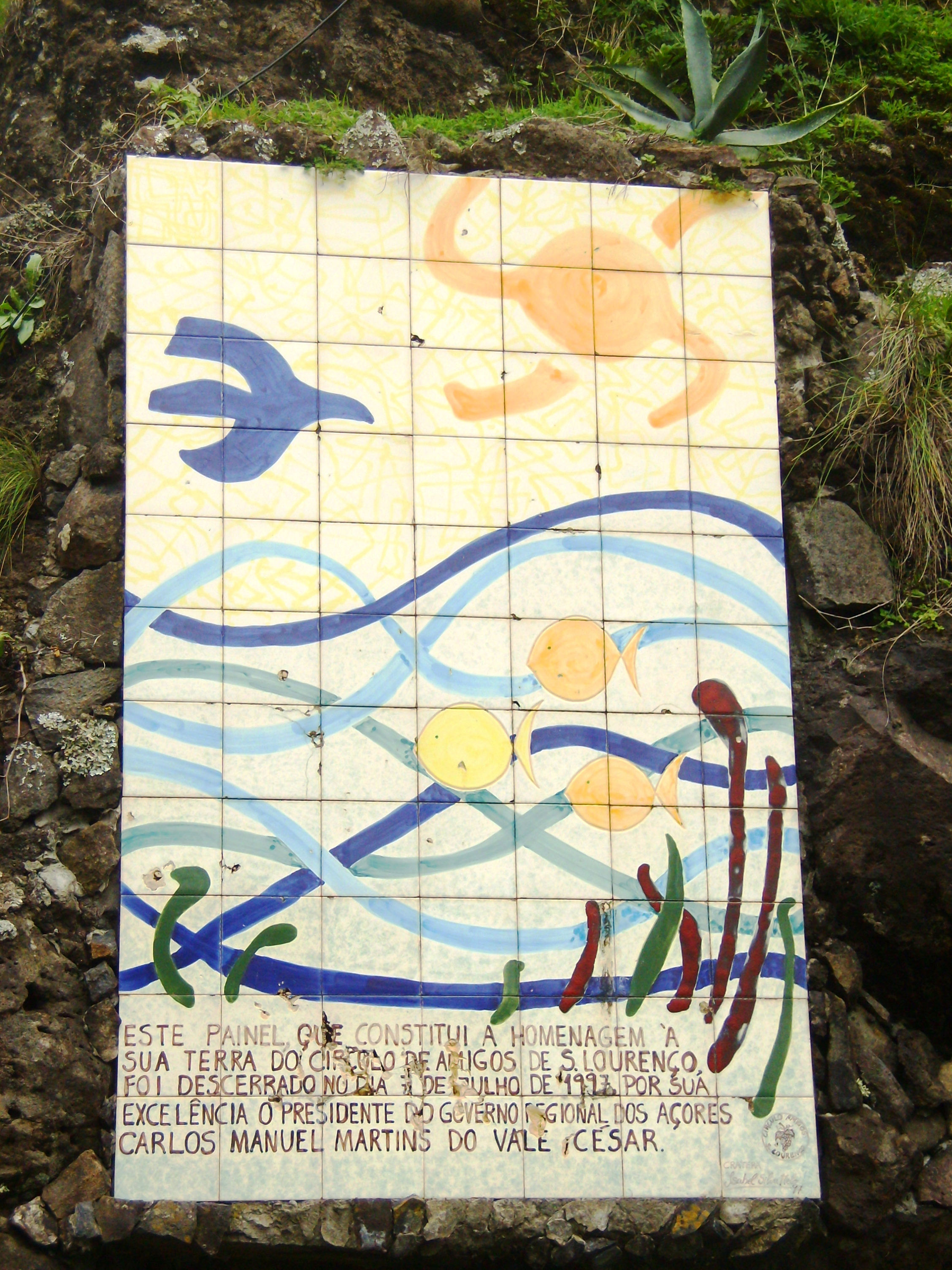 Baía de São Lourenço, freguesia de Santa Bárbara, concelho de Vila do Porto, ilha de Santa Maria, Açores: painel de azulejos de autoria de Isabel Melo (1997).